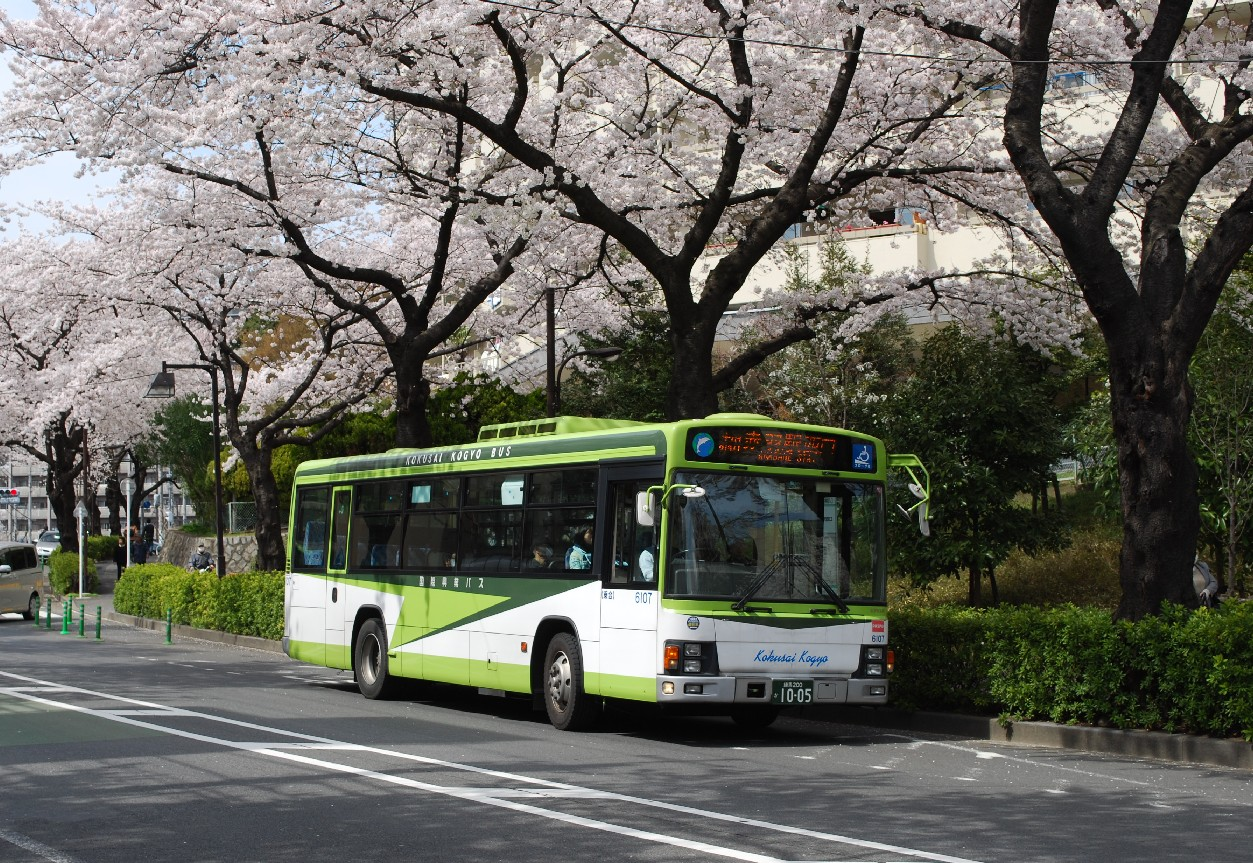 国際興業バス6107号車。東京北社会保険病院入口付近の公道上で撮影。